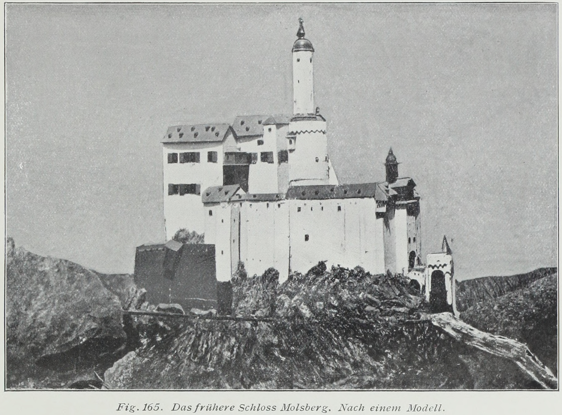 Das frühere Schloss Molsberg Nach einem Modell This is a photograph of an architectural monument.